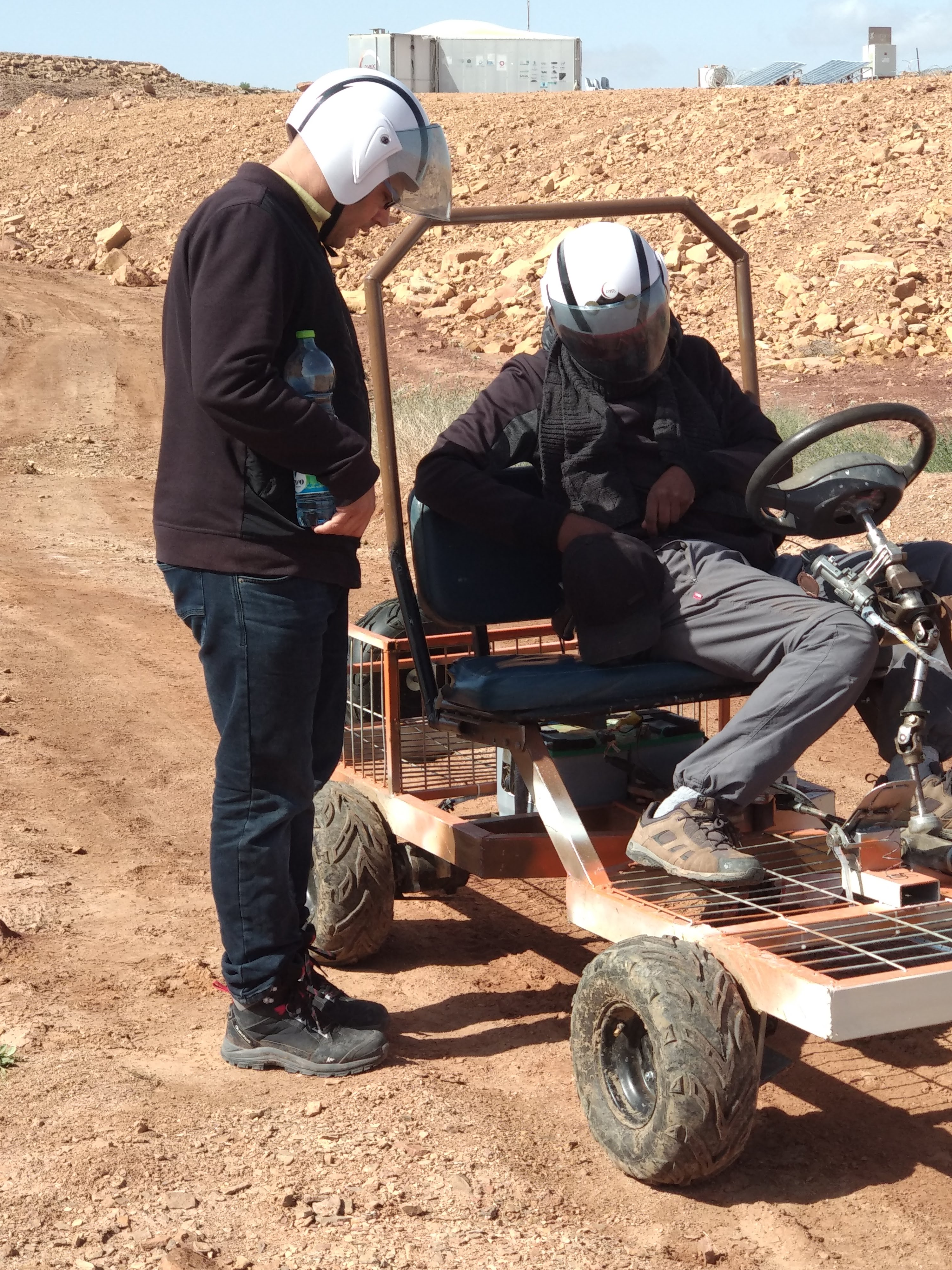 רכב חשמלי שנבנה ע"י אחת התלמידות בתוכנית בית הספר לאסטרונאוטים צעירים מחזור ג'. הרכב היה בשימוש במהלך הנסיעה. הרכב מאפשר הגדלת טווח התנועה של הרמונאוטים ומאפשר נשיאת משאות בתא המטען שלו.